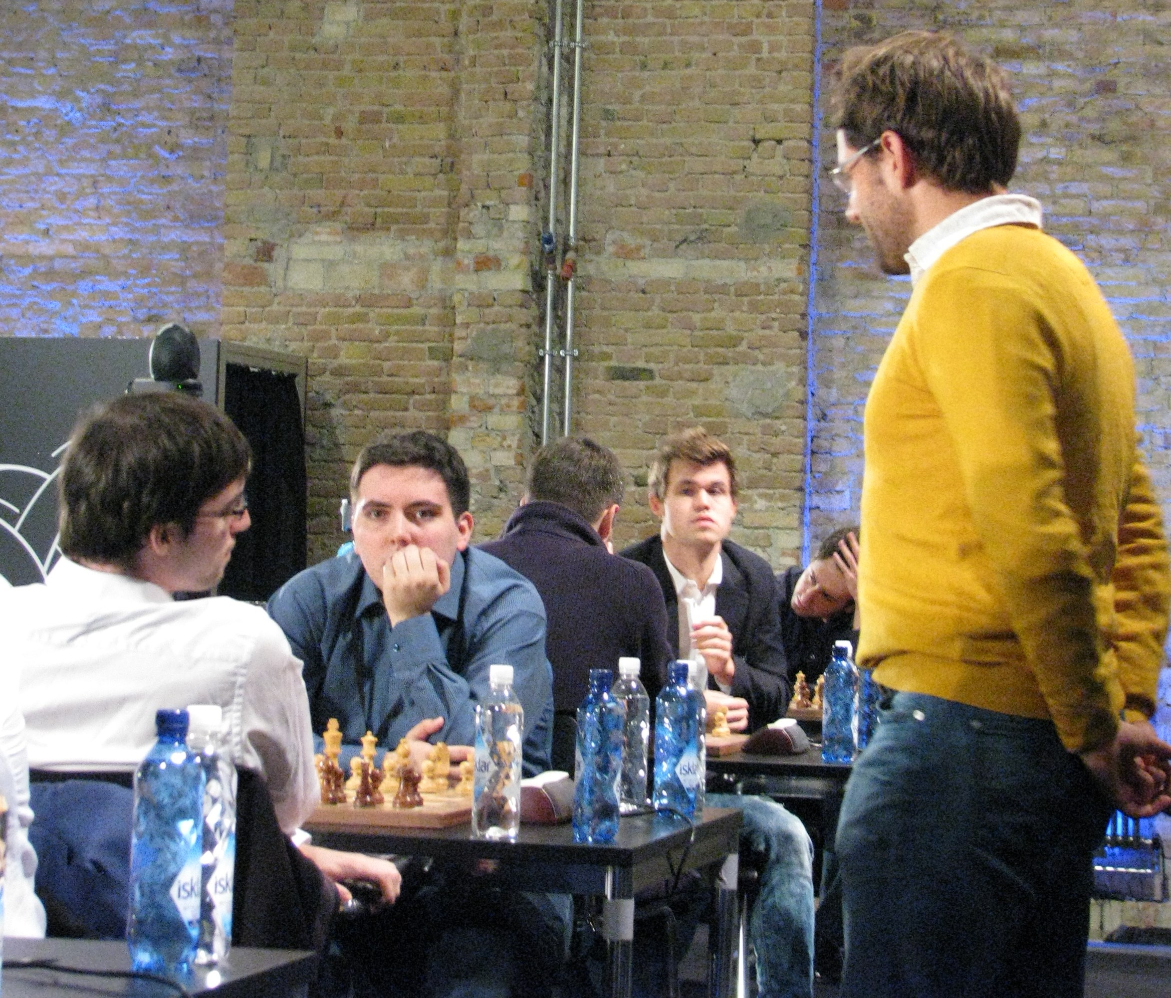 Schachweltelite auf dem Podium zur Blitzschach-WM Berlin 2015